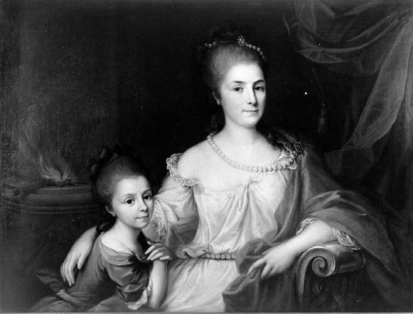 Ritratto di Bianca Ferrario Viscontini e della figlia Elena, olio su tela, 116x88 cm, Castello Sforzesco, Milano